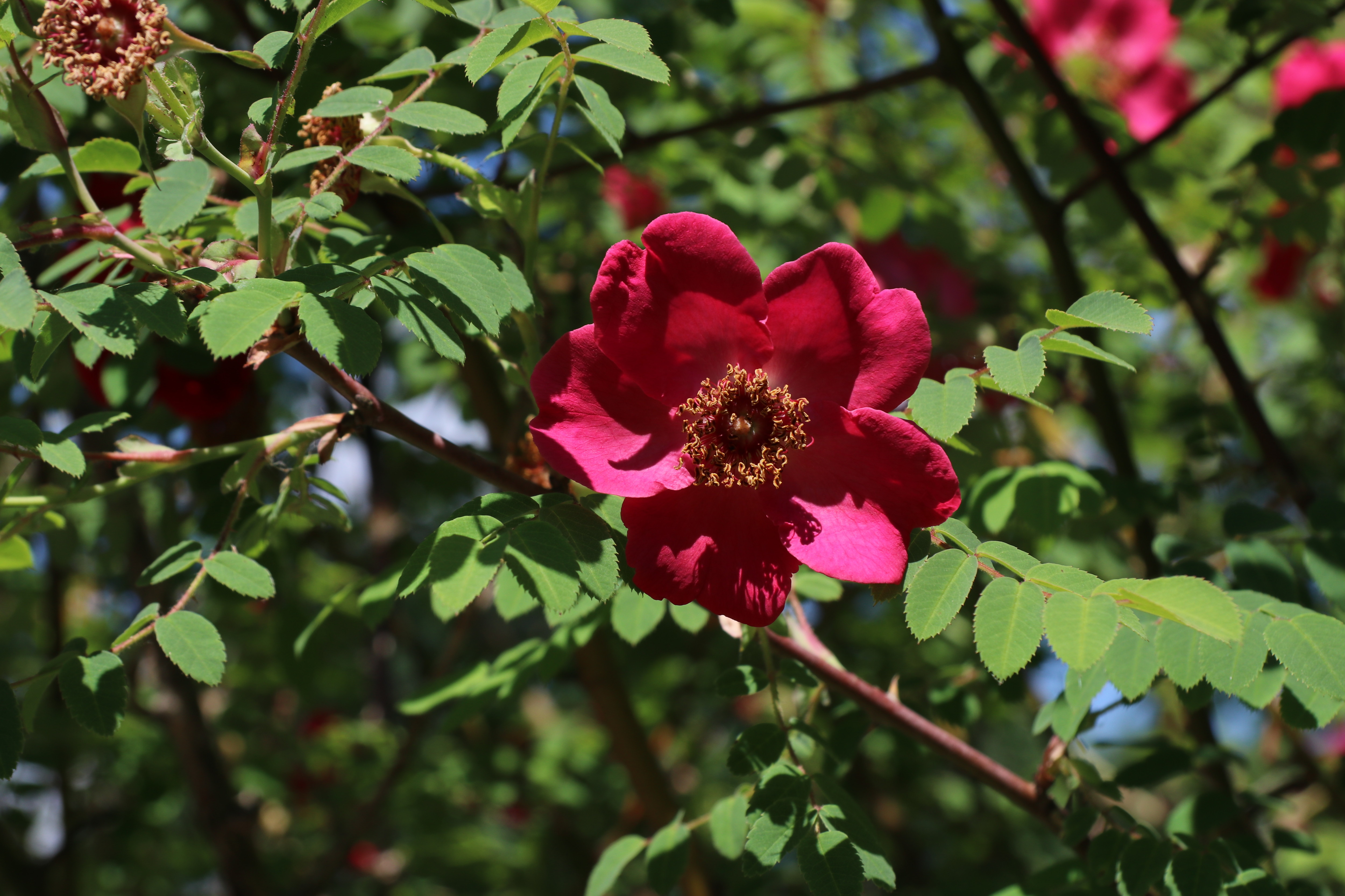 Rosa moyesii im Botanischen Garten Dresden